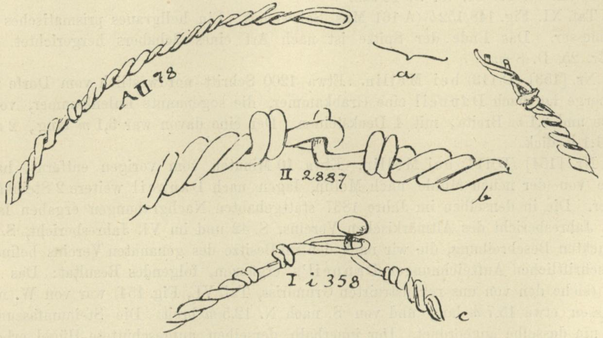 Halsring aus Bronzedraht aus dem zerstörten Großsteingrab Tangeln KS 154 (oben) mit Vergleichsstücken